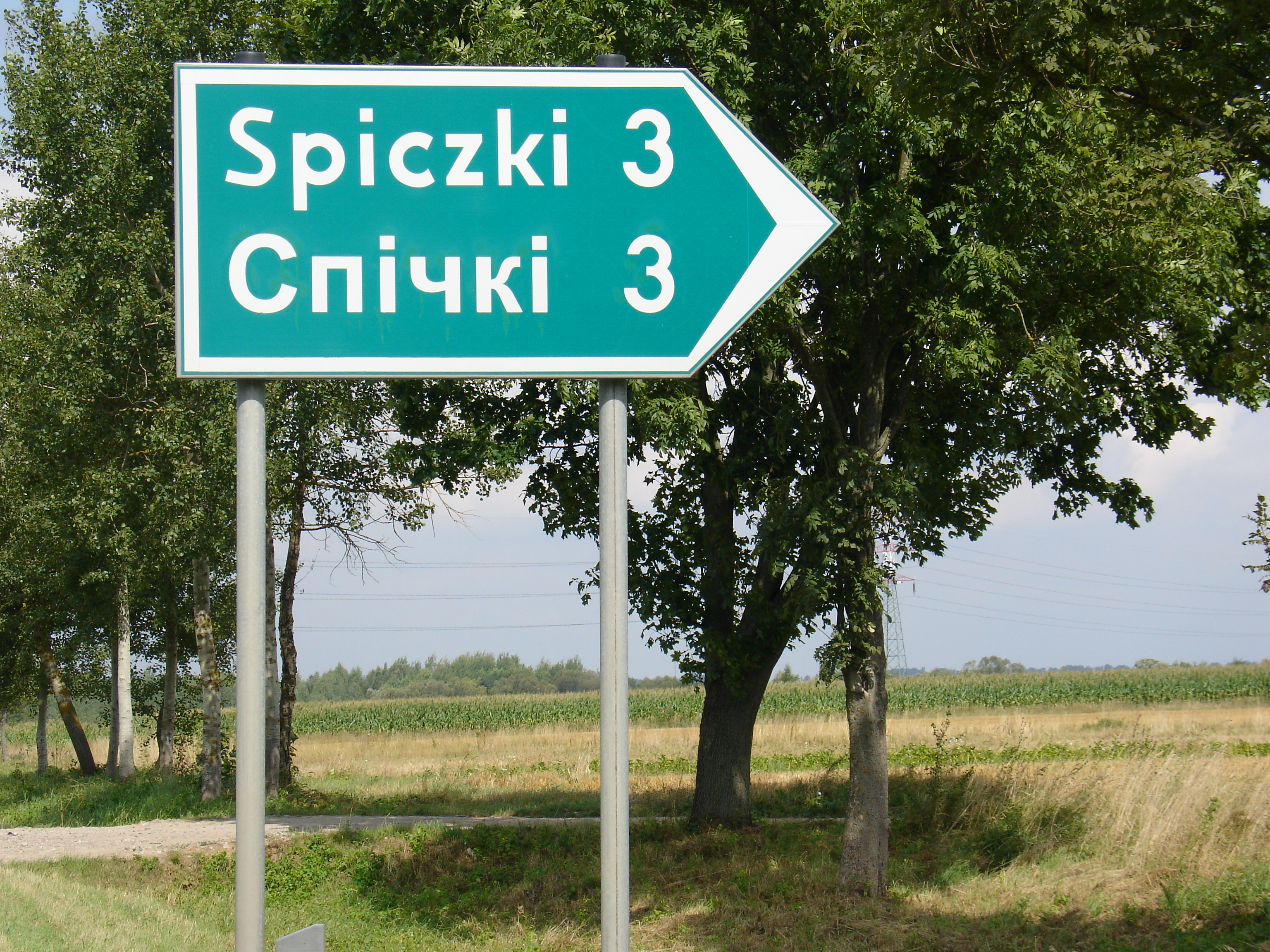 Dwujęzyczna tablica w Spiczkach w gminie Orla